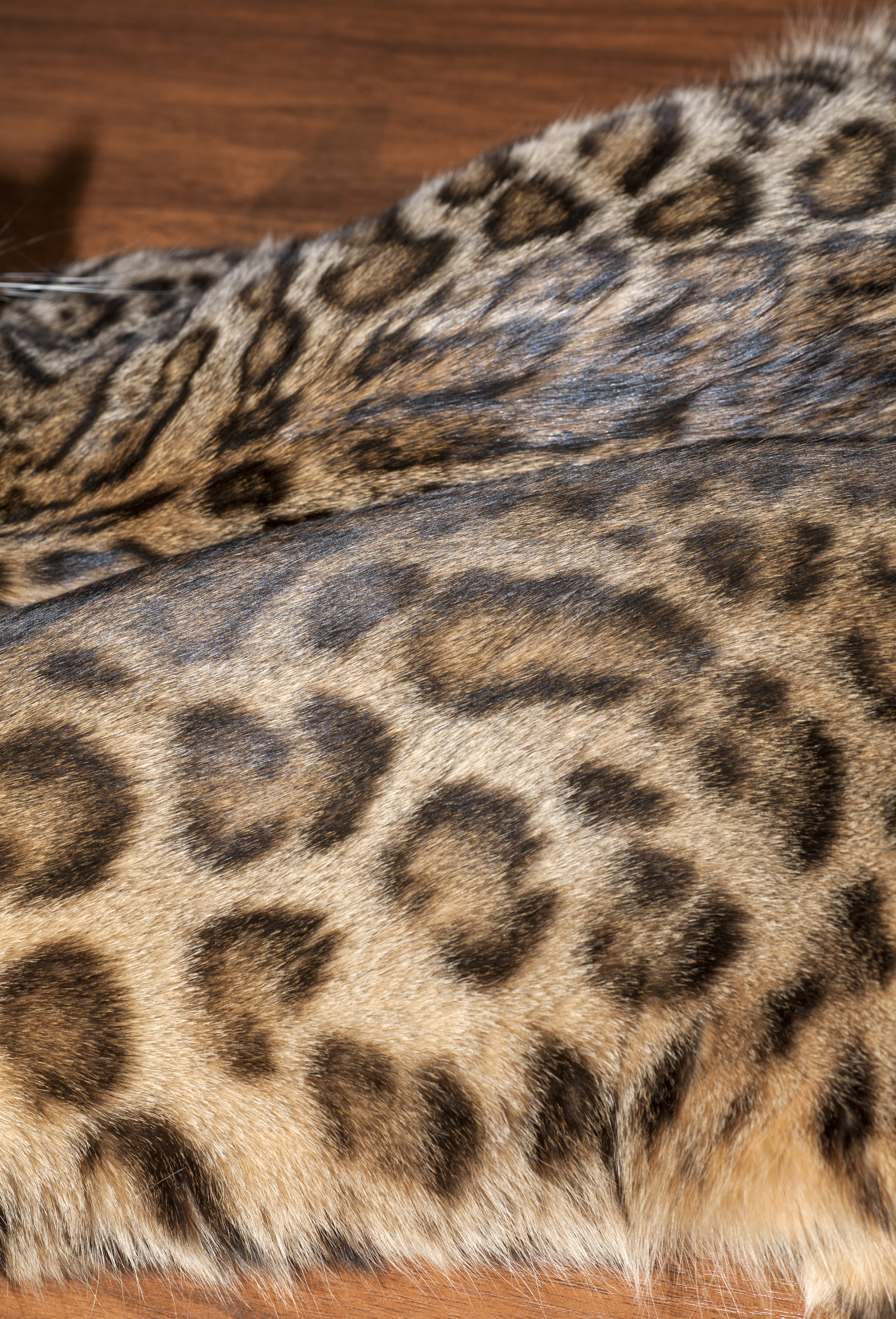 Бенгальские кошки, дальняя: Wild Blood Miledi, №925 по каталогу «Содружество-2014» (WCF). Кошка. Окрас: чёрный пятнистый (BEN n 24). Дата рождения: 16/10/2013. Ближний: World Ch. Indigo FleurAmour, №1025 по каталогу «Содружество-2014» (WCF). Кот. Окрас: чёрный пятнистый (BEN n 24). Дата рождения: 05/04/2012. Владелец: Е.В.Моселкова. Клуб «РосКош», Москва